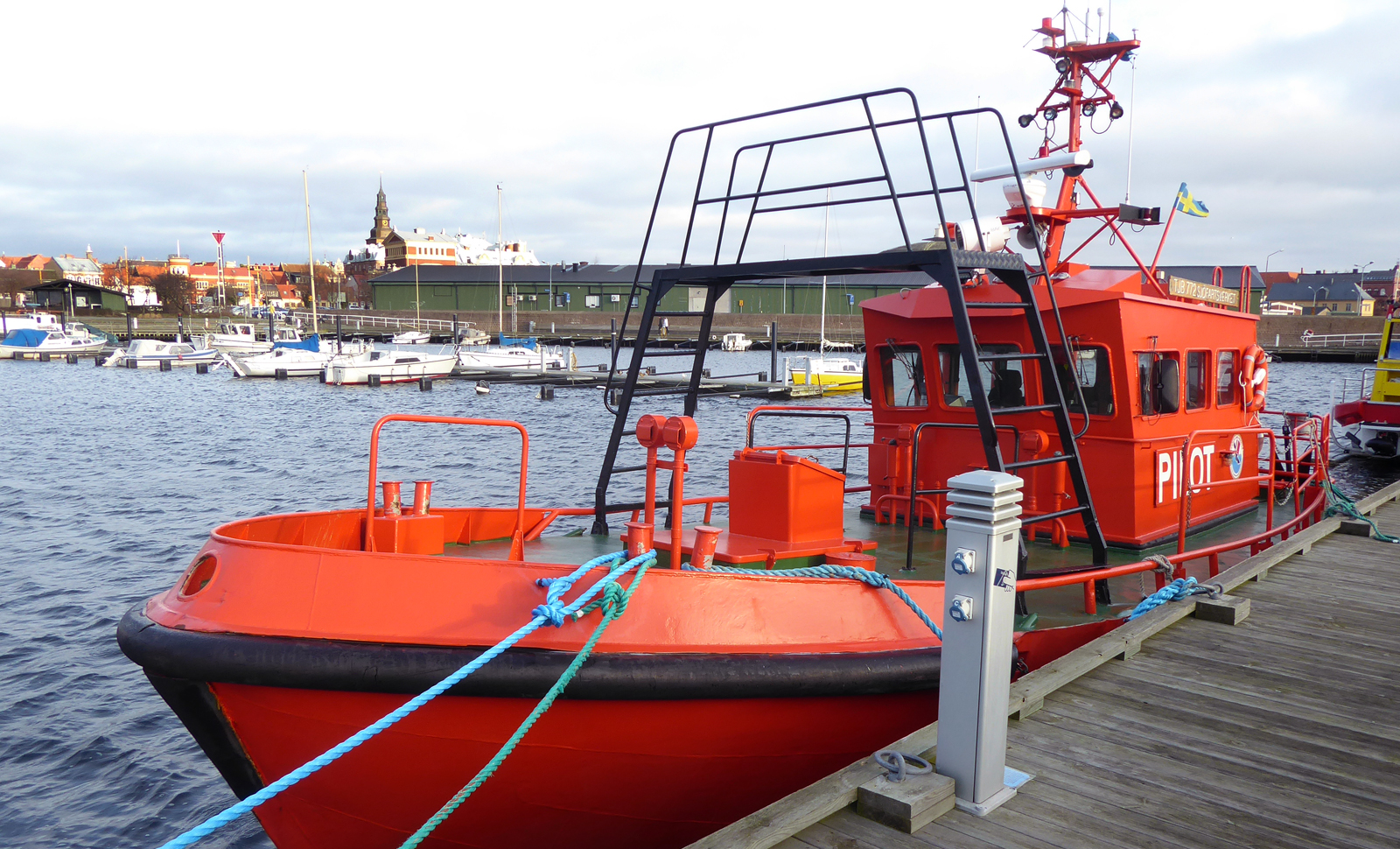 Ystads Lotsbåt TJB 772 Sjöfartsverket i Ystad småbåtshamn 1 jan 2020.